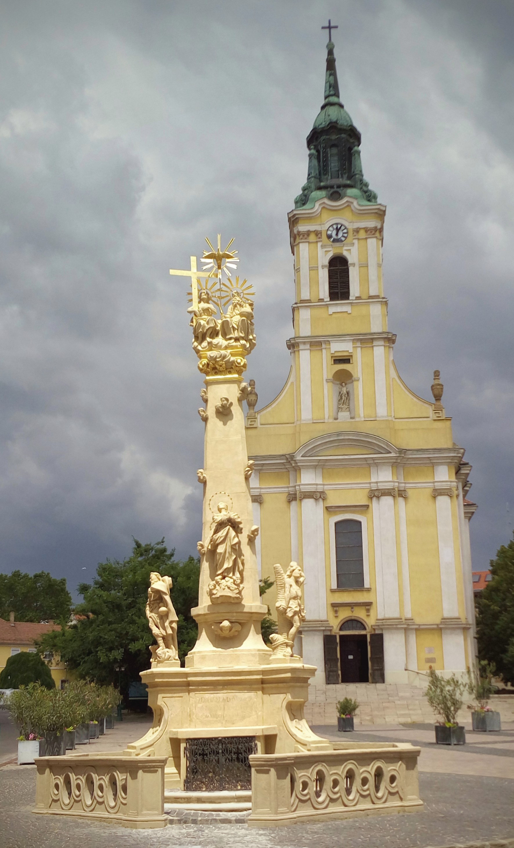 A 2017-ben felújított Szentháromság szobor a copf stílusú katolikus Urunk Mennybemenetele templommal a háttérben.